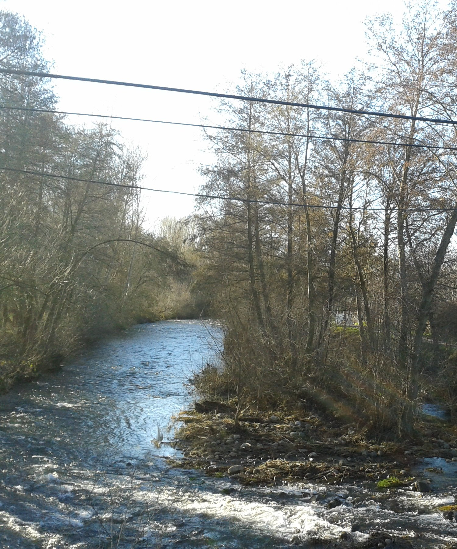 Vista del río Boeza desde el puente de Albares de la Ribera.